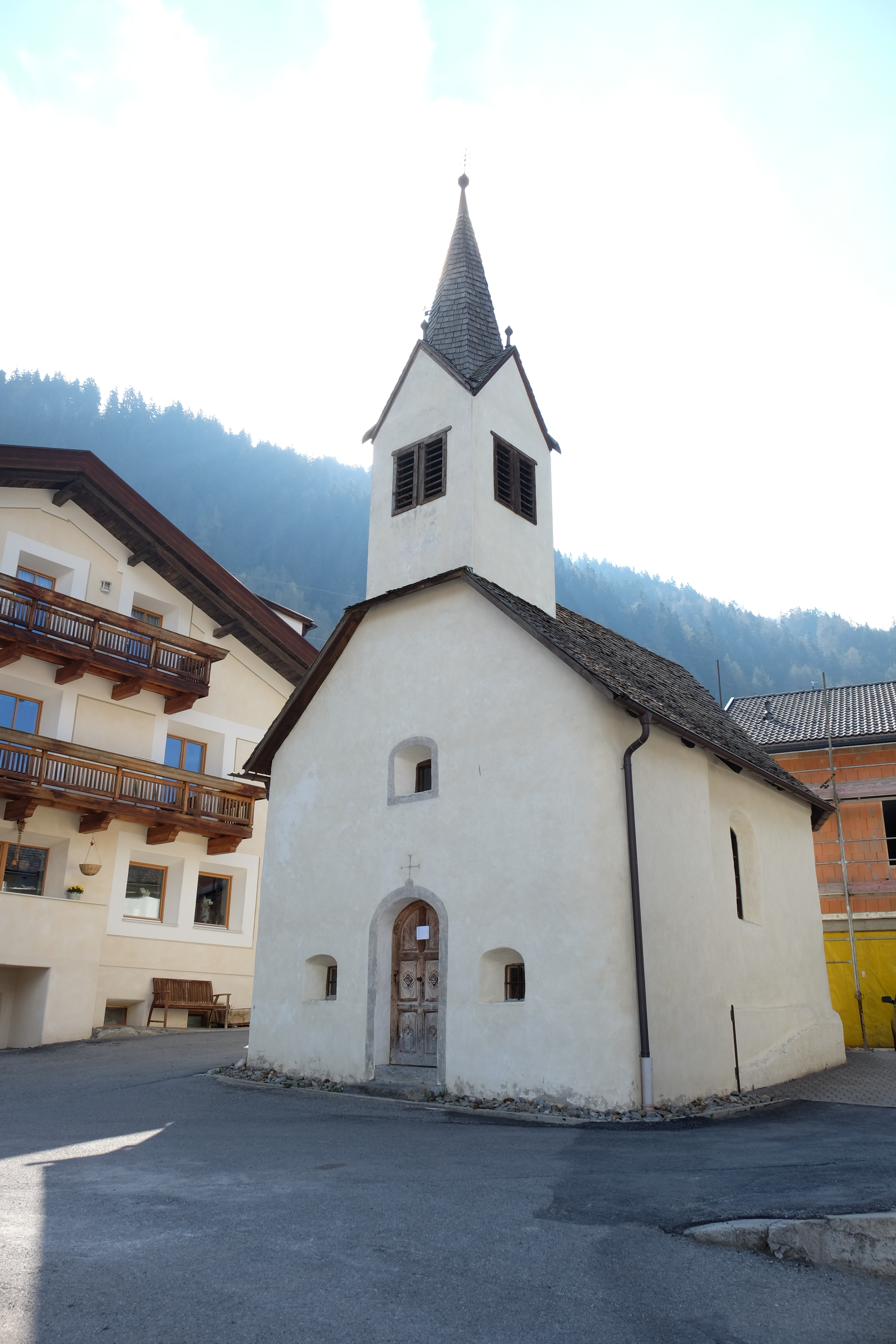 St. Josef in Monteplair (Gemeinde Graun im Vinschgau, Südtirol) - konsekriert von Fürstbischof Ulrich VII. am 10.10.1705